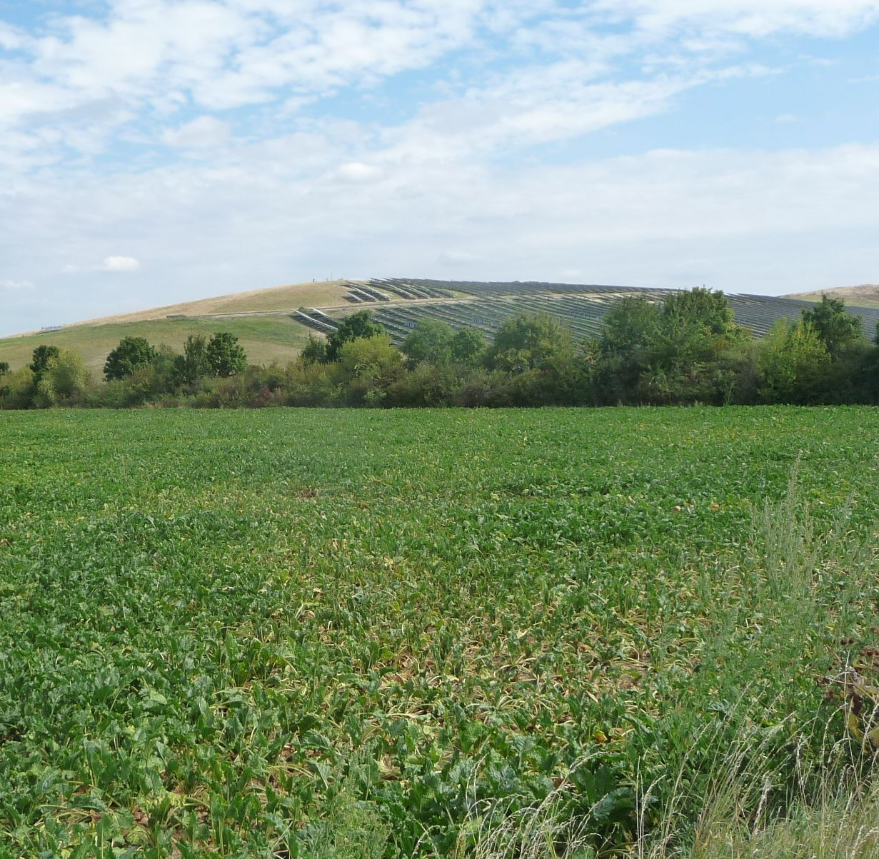 Müllberg der Firma Süd-Müll